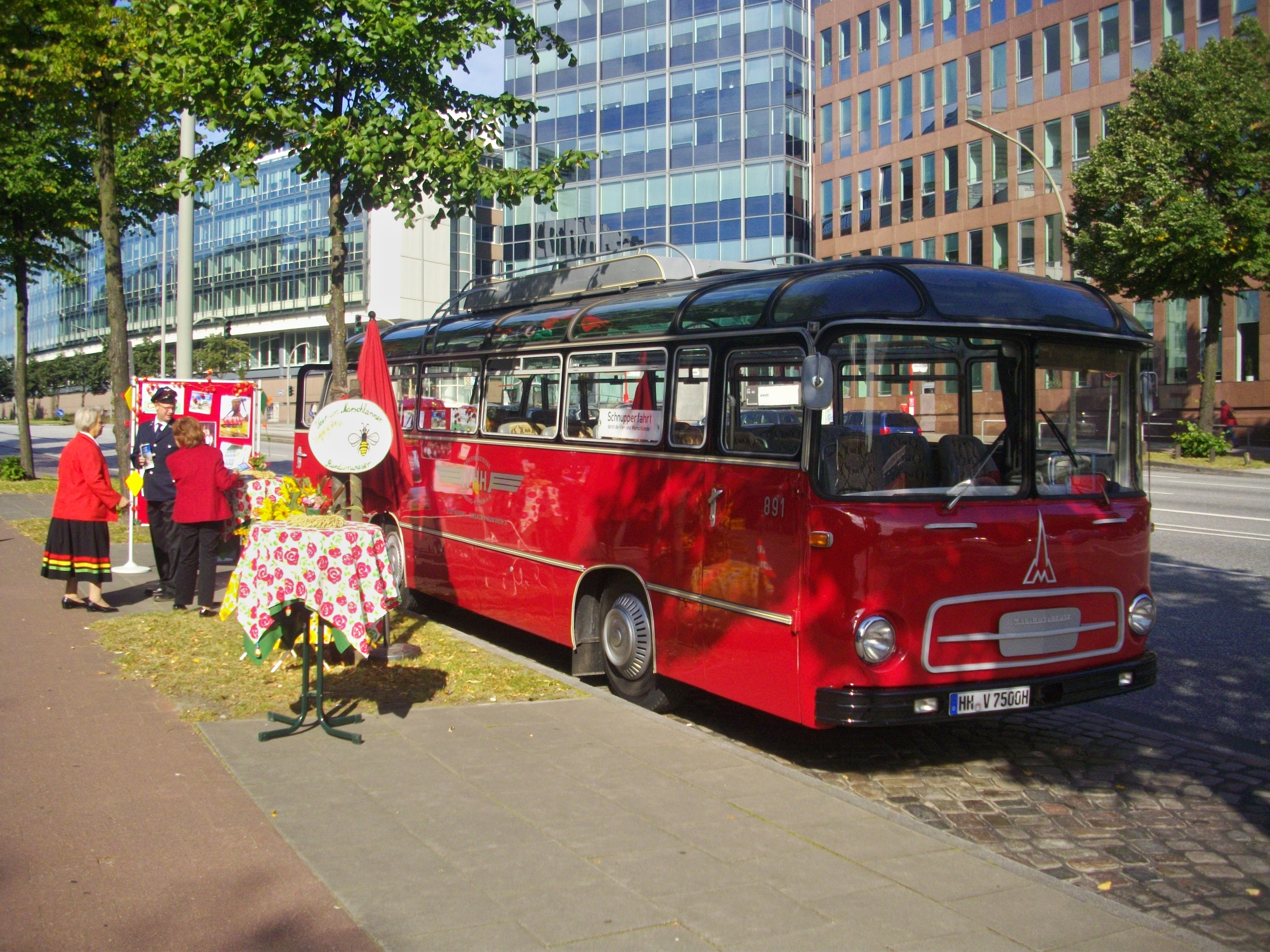 Alter Bus